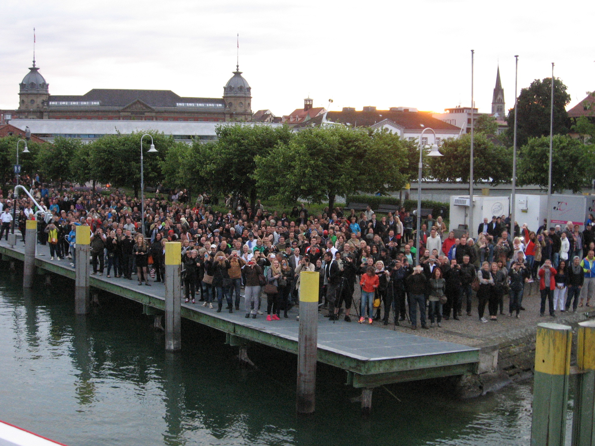 Schaulustige im Hafen von Konstanz erwarten die MS Schwaben mit der Party Torture Ship. Bild von der MS Schwaben aufgenommen.